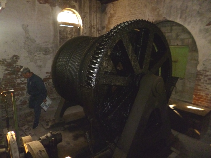 宮原坑巻き上げ機室内のウインチ。大型の機械や資材を坑内へ搬出入する必要があるときに活躍していました。